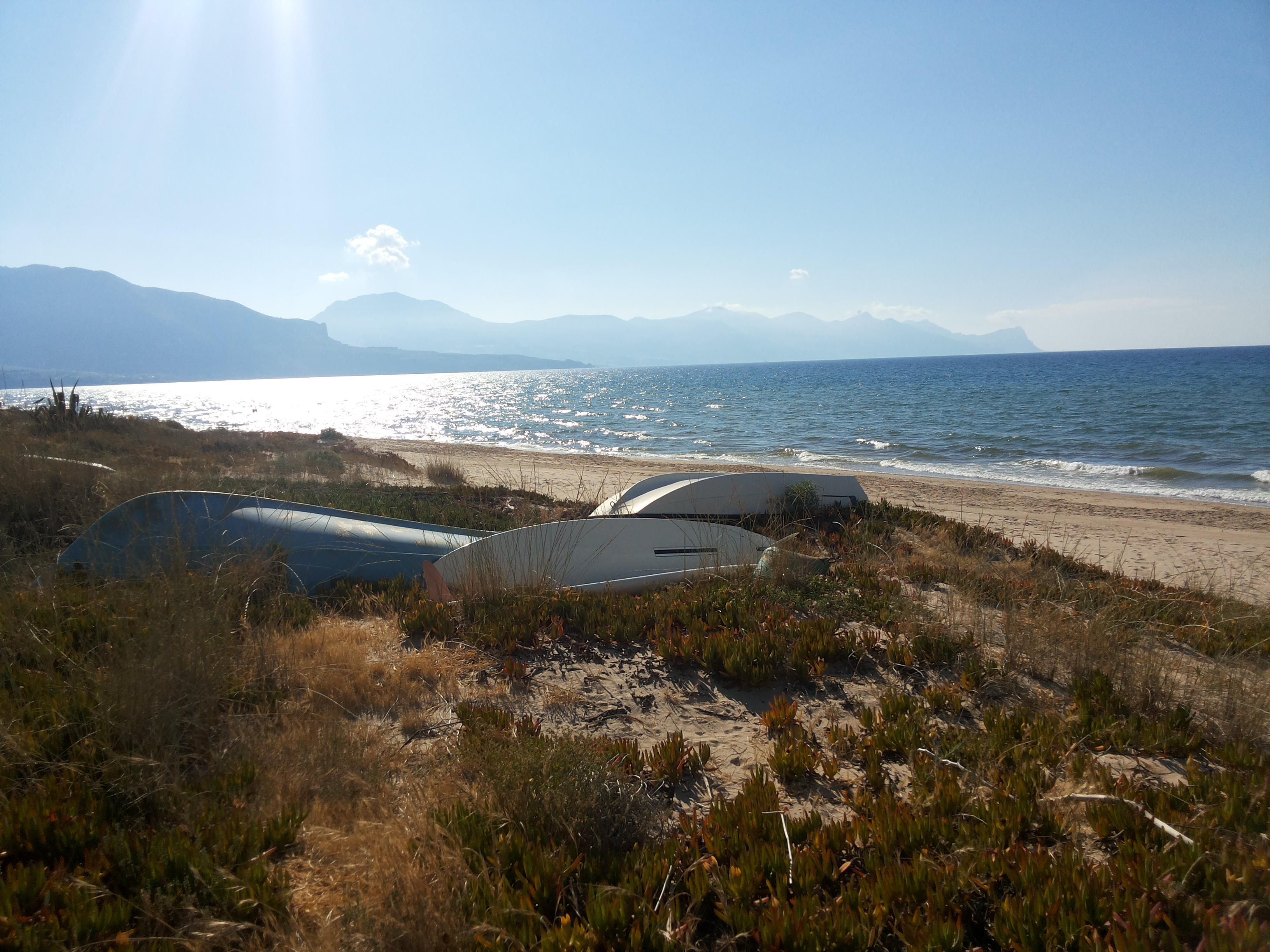 Barche sulla spiaggia di Alcamo Marina